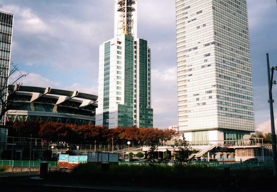 さいたま新都心の中心部。2008年12月下旬に利用者が撮影。